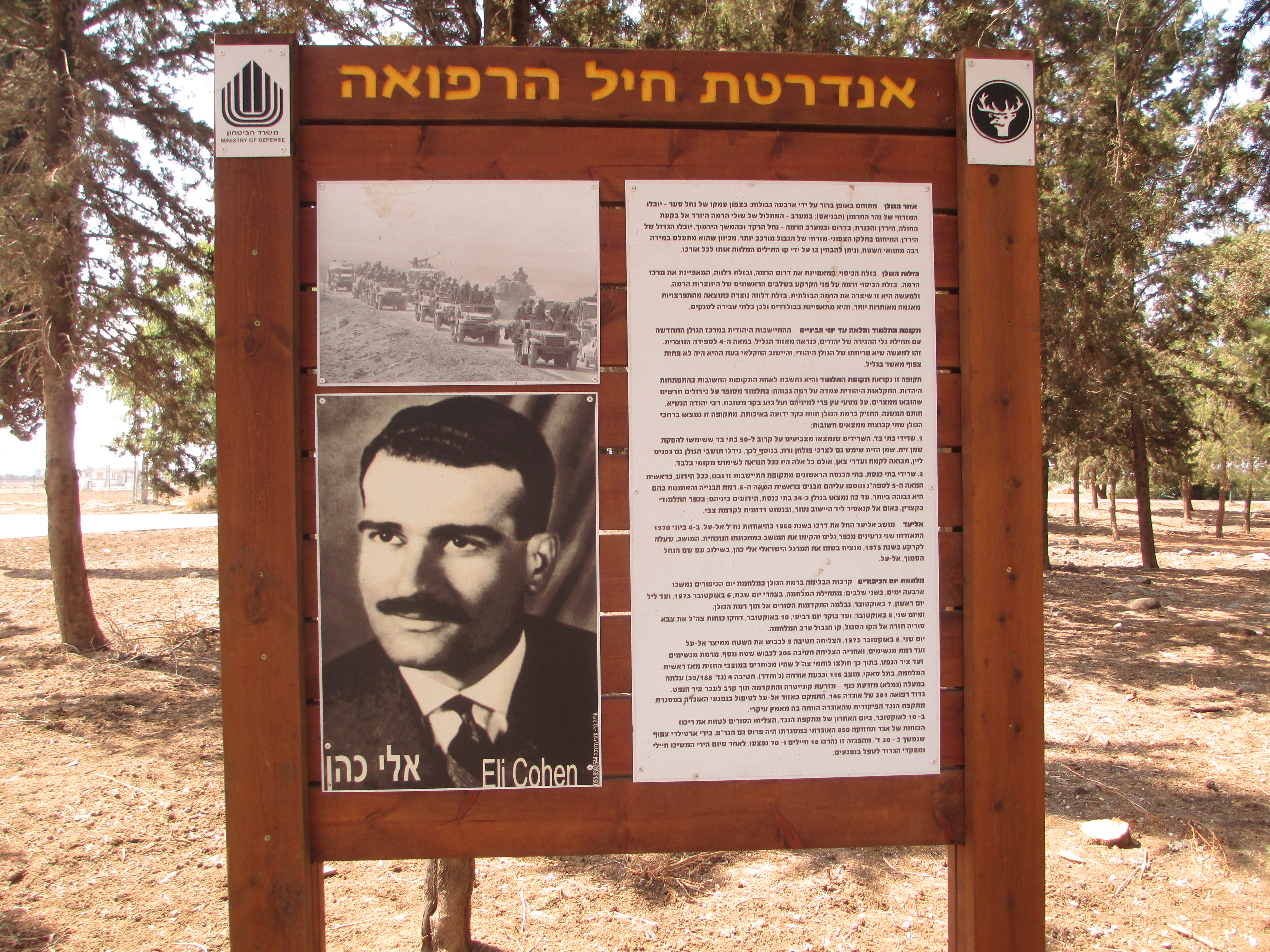 שלט הסבר באנדרטת גר"פ 281